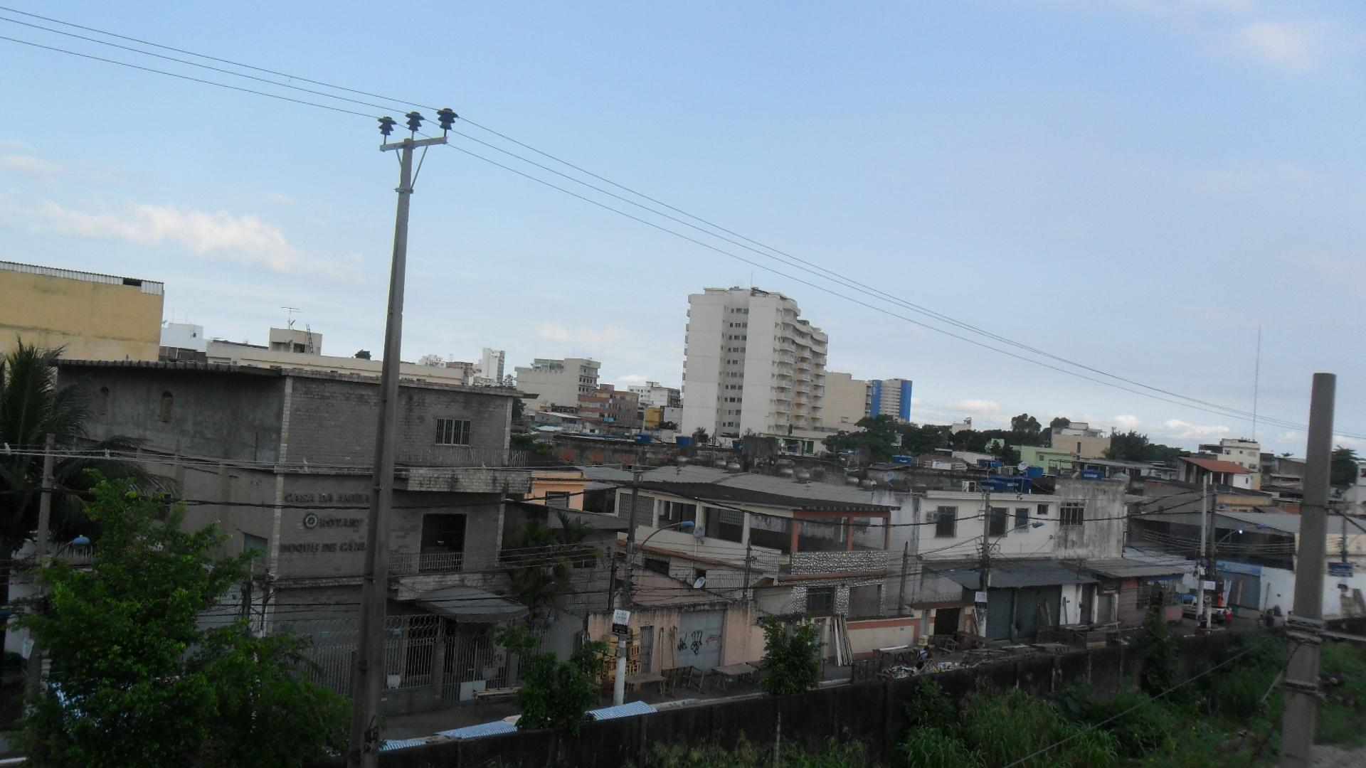 Jardim 25 de Agosto